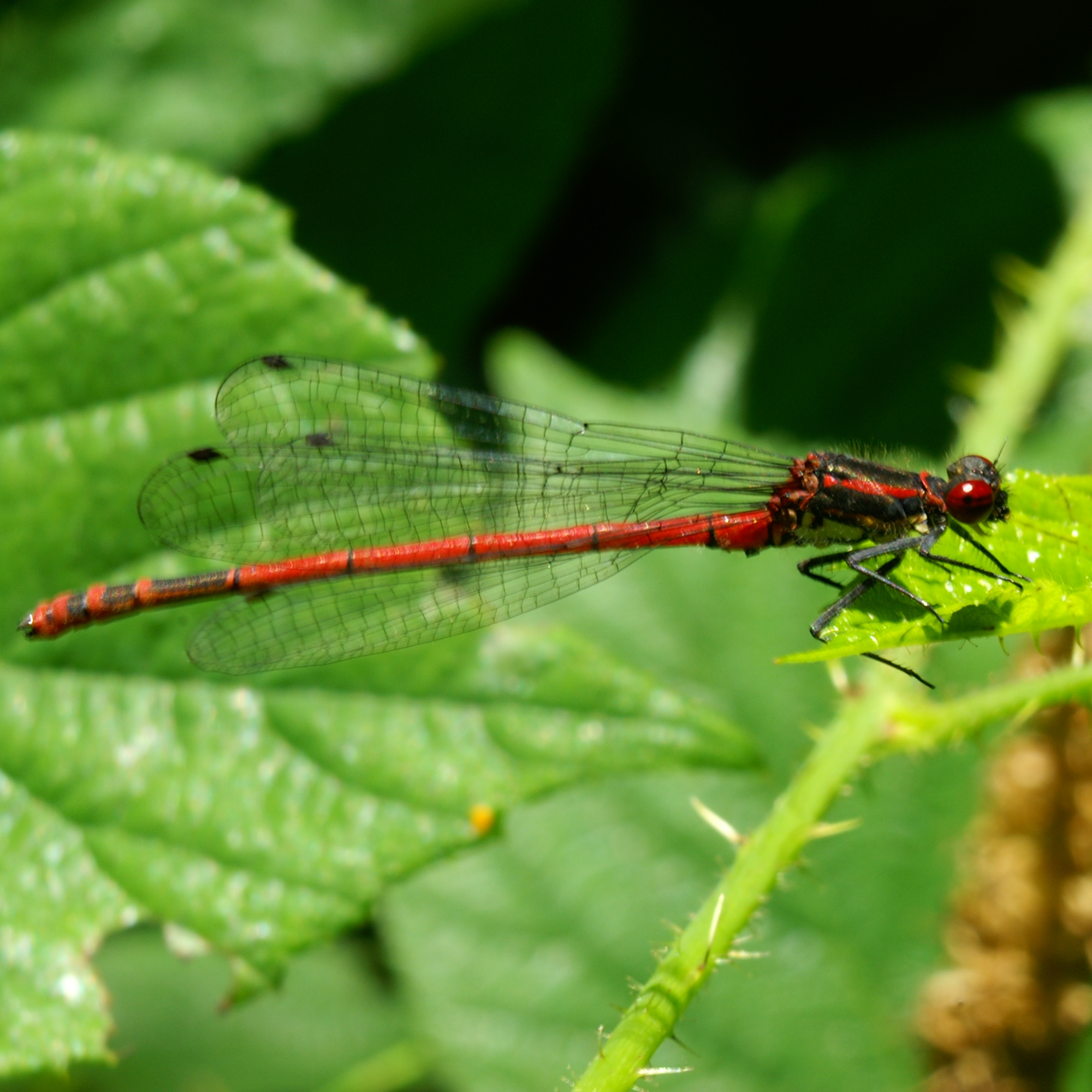 Frühe Adonisjungfer männlich